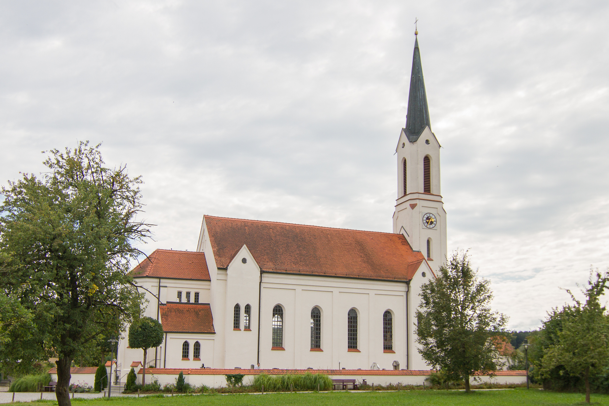 Kath. Pfarrkirche St. Anna erbaut 1856/57; mit Ausstattung.This is a photograph of an architectural monument.